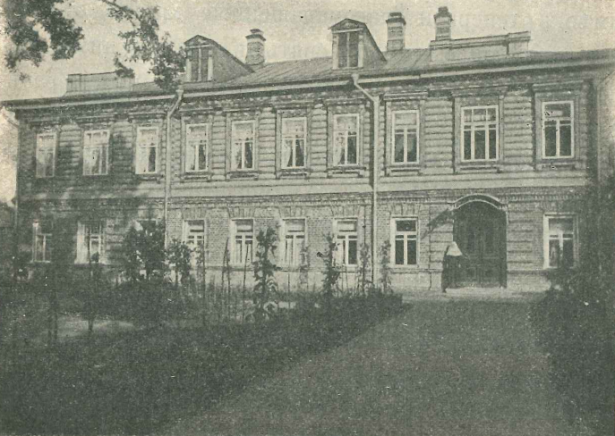 Настоятельский корпус Казанского Головинского монастыря в 1912 году